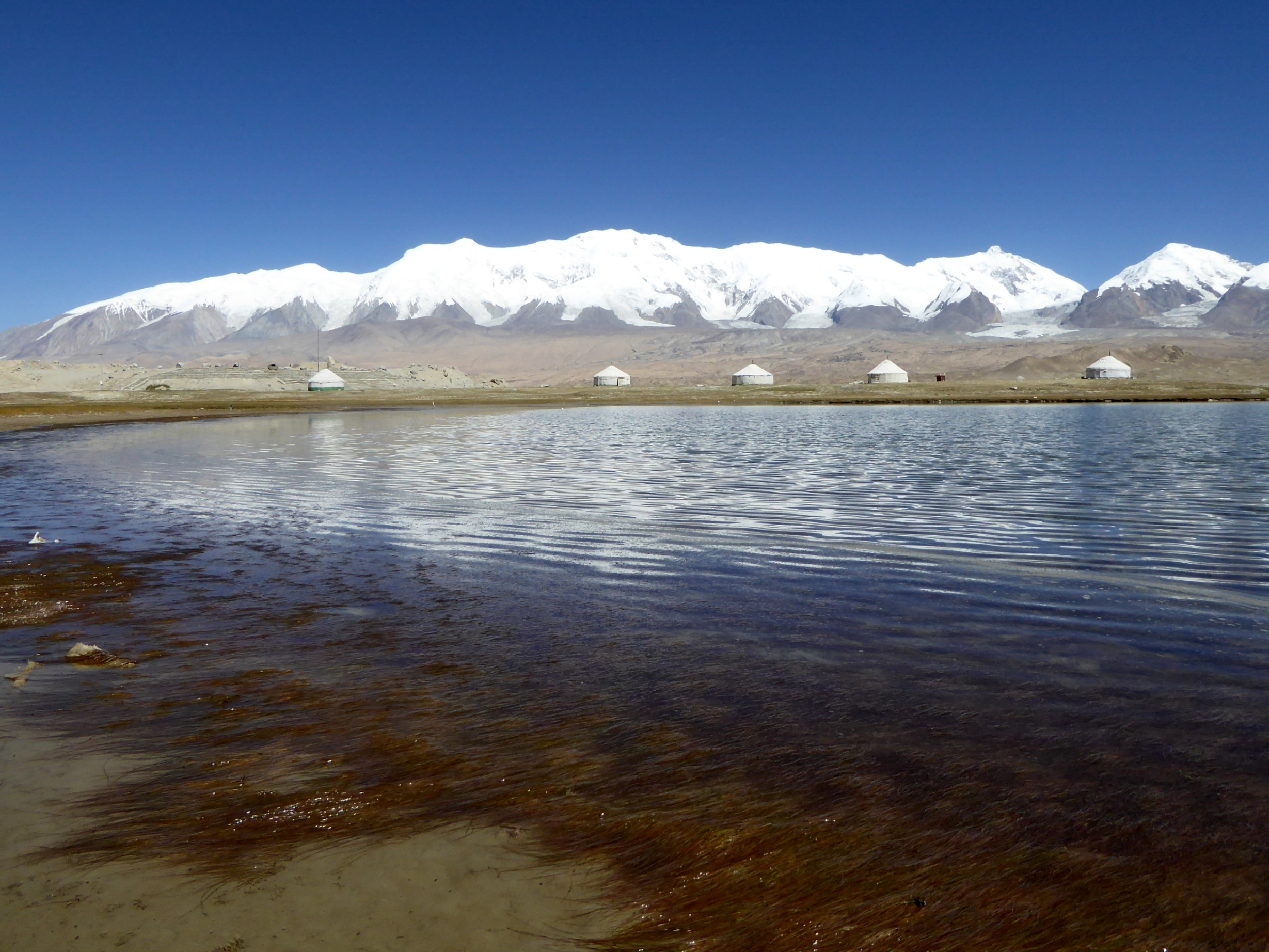 7,719m Kongur Tagh 3,600m Lake Karakul Karakoram Highway Kyrgyz Xinjiang China 新疆 吉爾吉斯 喀喇昆仑公路 喀喇昆仑公路 喀拉庫勒湖 公格尔峰